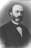 Portrait de Ludwig Minkus